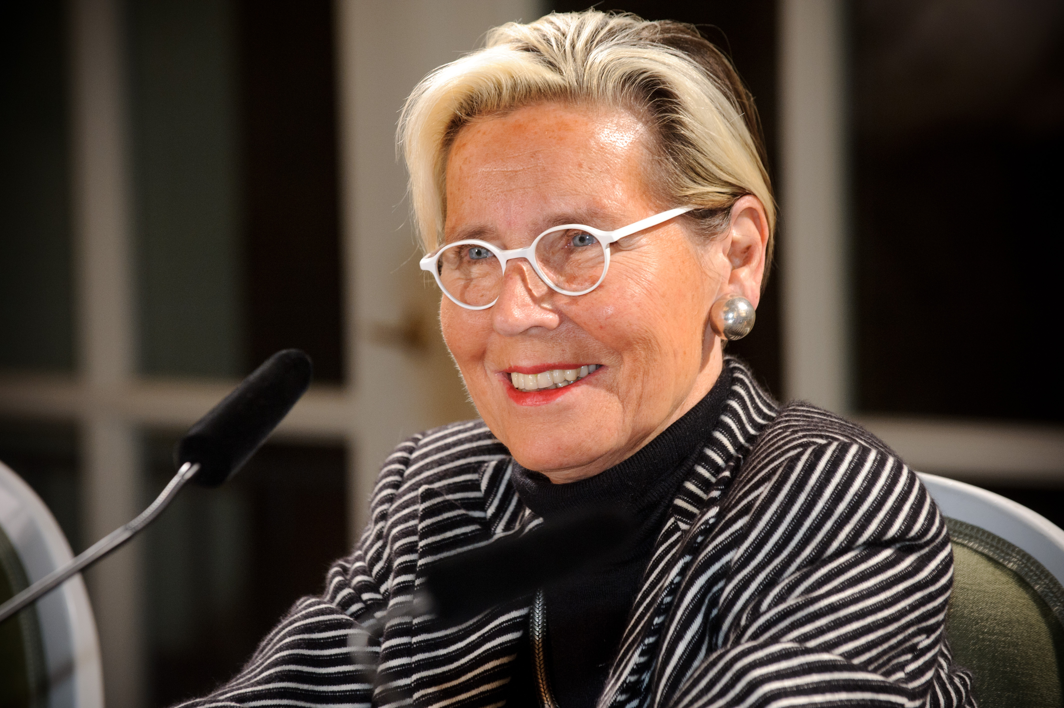 Silvia Bovenschen (Schriftstellerin) Lesung: Wie geht es Georg Laub? - Silvia Bovenschen Foto: Stephan Röhl